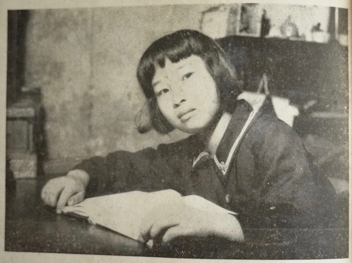 黃鳳姿